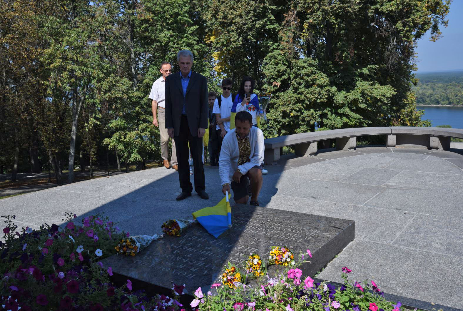 ТД 2-12 На могилі Кобзаря